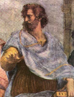 384 - 322 a.C